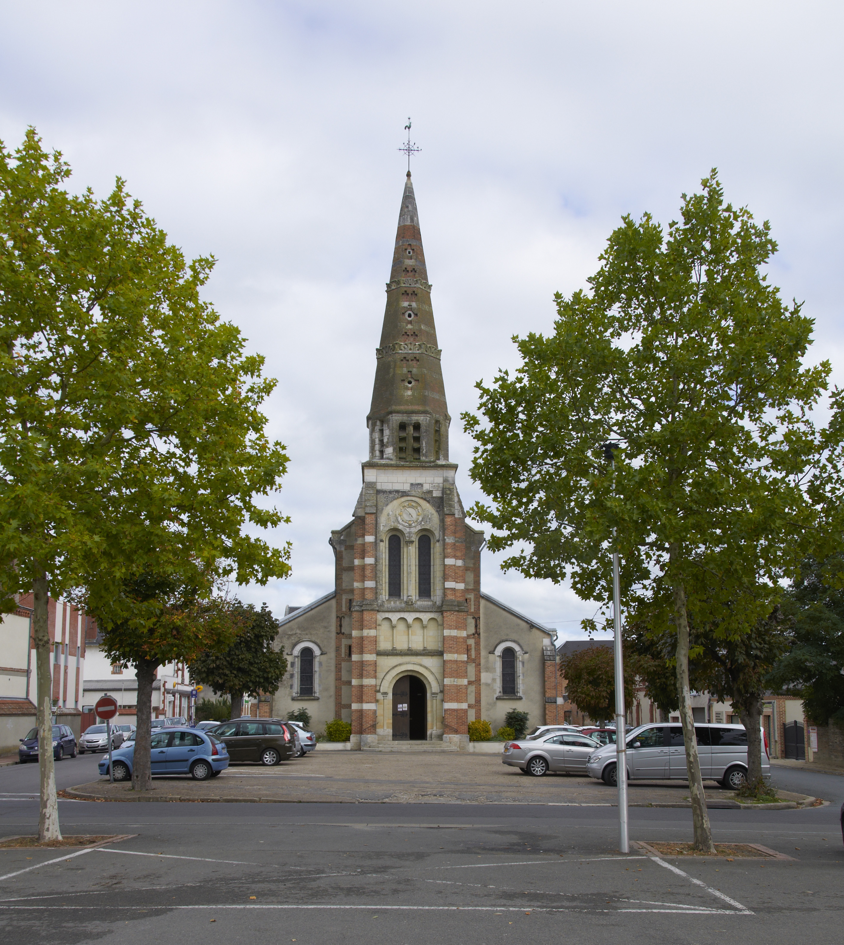 Église Sainte-Anne, Lamotte-Beuvron, Loir-et-Cher, France